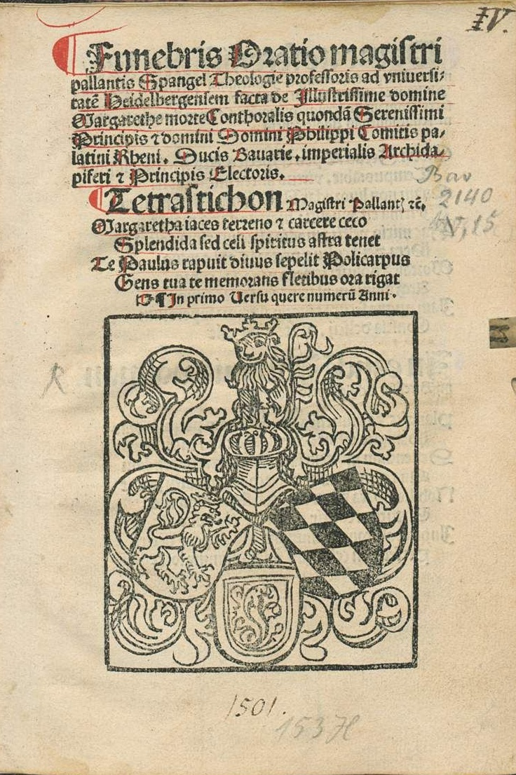 Pallas Spangel, Rektor Universität Heidelberg, Buchtitelseite